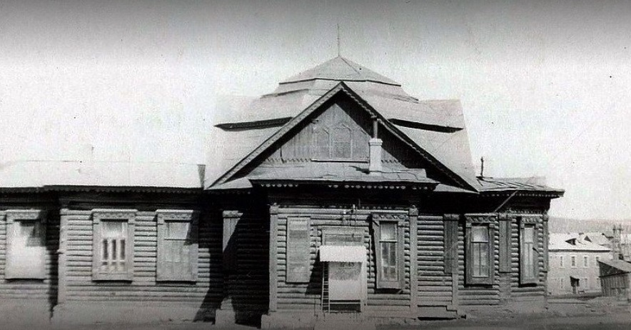 Церковь Николая Чудотворца.Никольская церковь. Сгоревшая церковь в г. Бакал